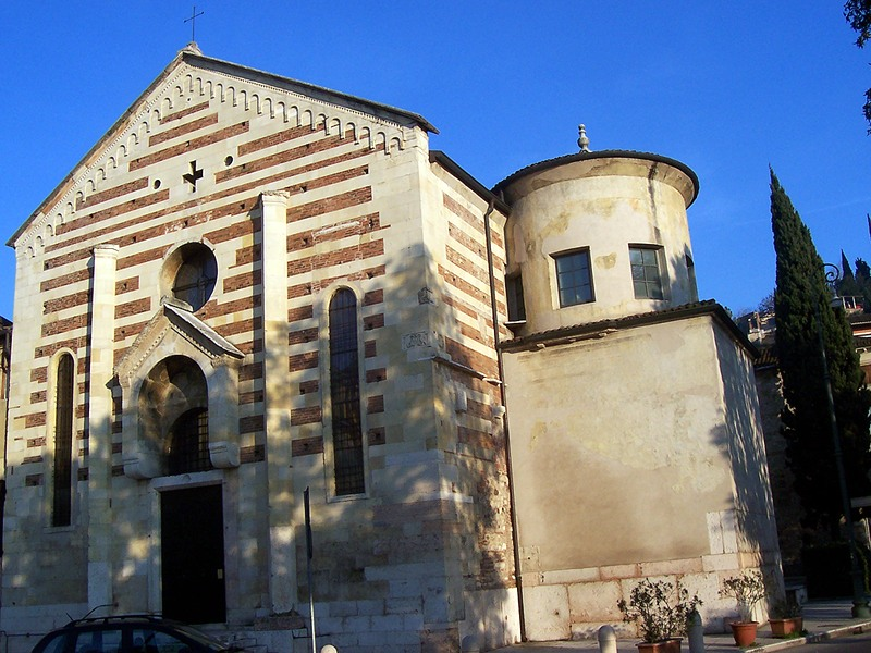 Verona - Chiesa di S. Stefano